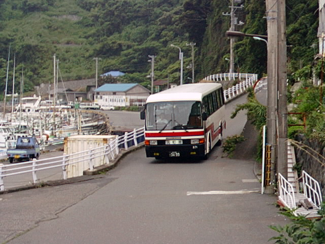 Tokai Kisen (Oshima Bus) 871 Mitsubishi P-MS713N at Habu Port.